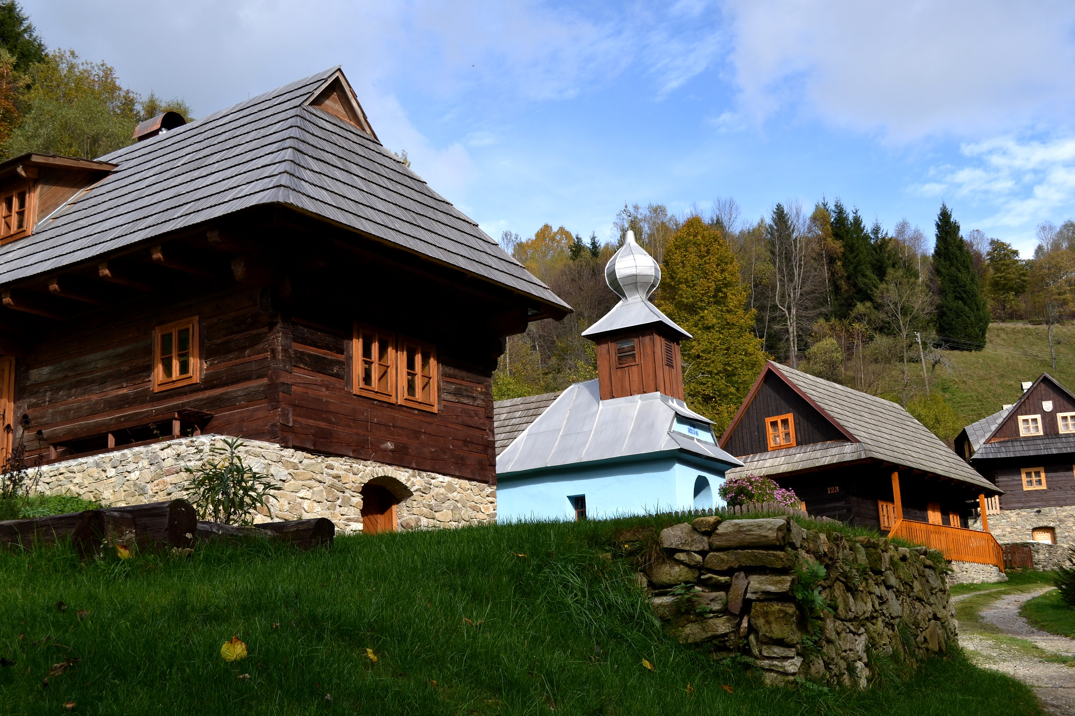 Drábsko - Kysuca; pohľad na časť usadlosti